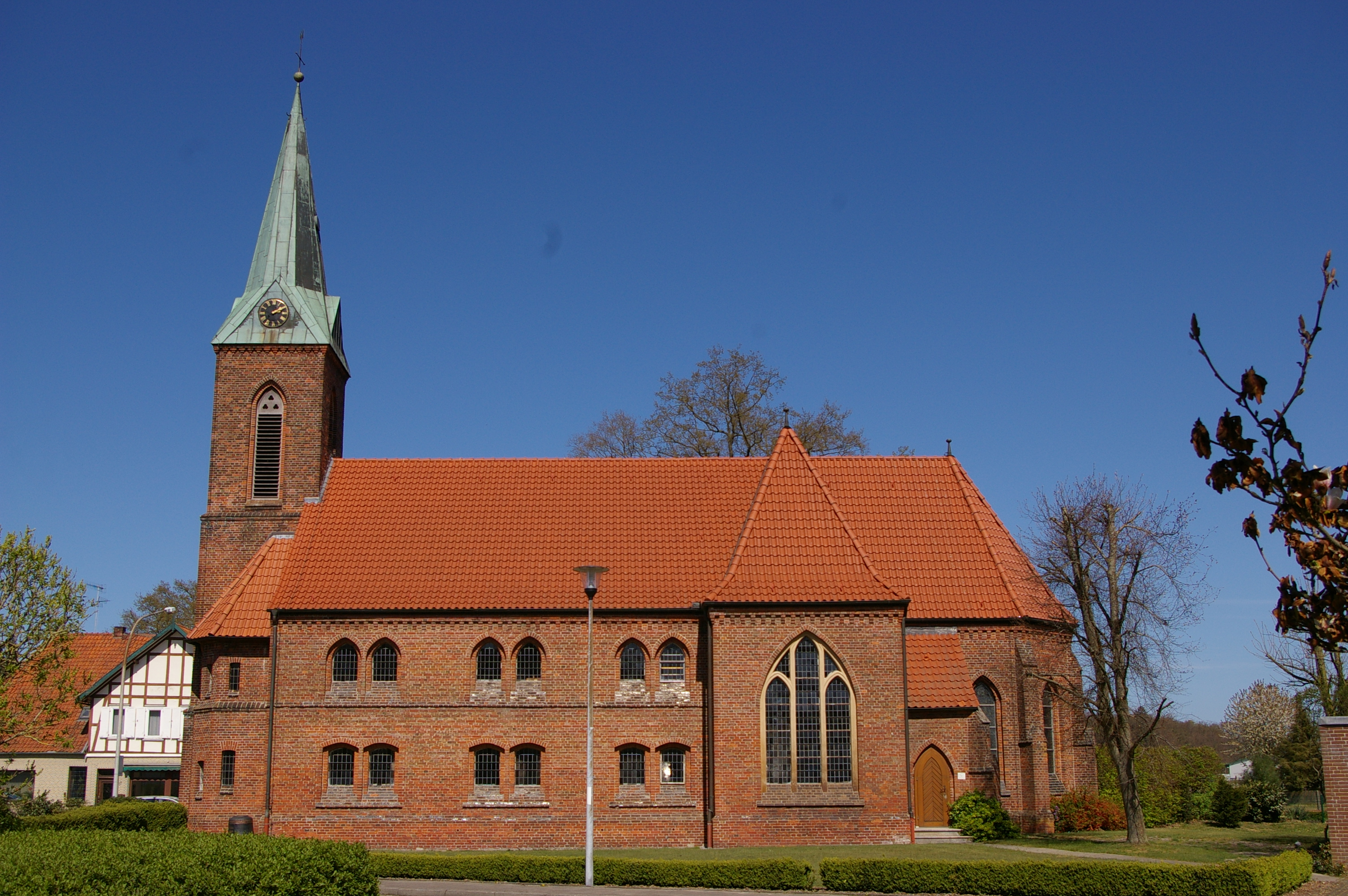 Kirchen in Rehden